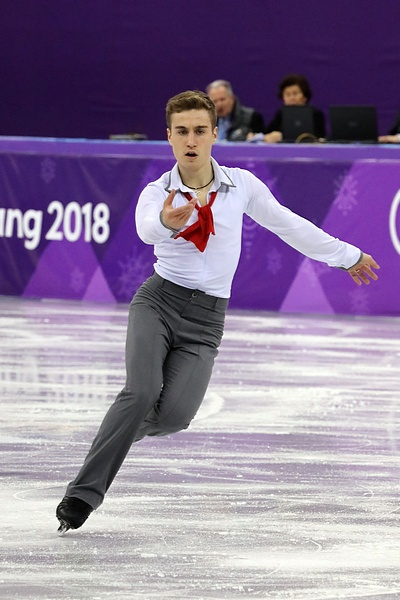 Маттео Риццо на Олимпиаде-2018